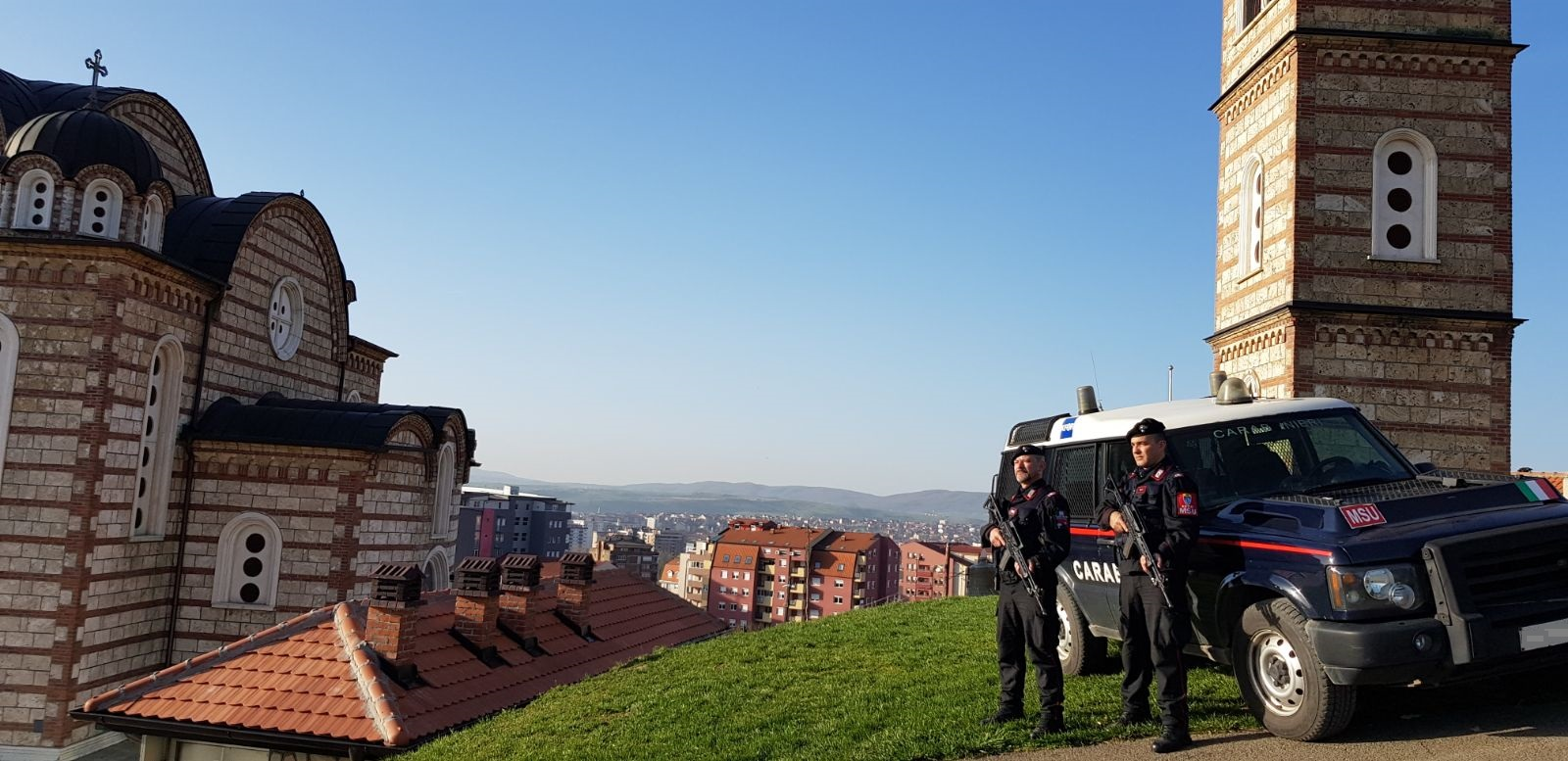 Pattuglia di MSU dell'Arma dei Carabinieri in Mitrovica, Kosovo. Anno 2017 Veicolo Land Rover Discovery 2. Targa modificata e coperta con programma di editor visuale.